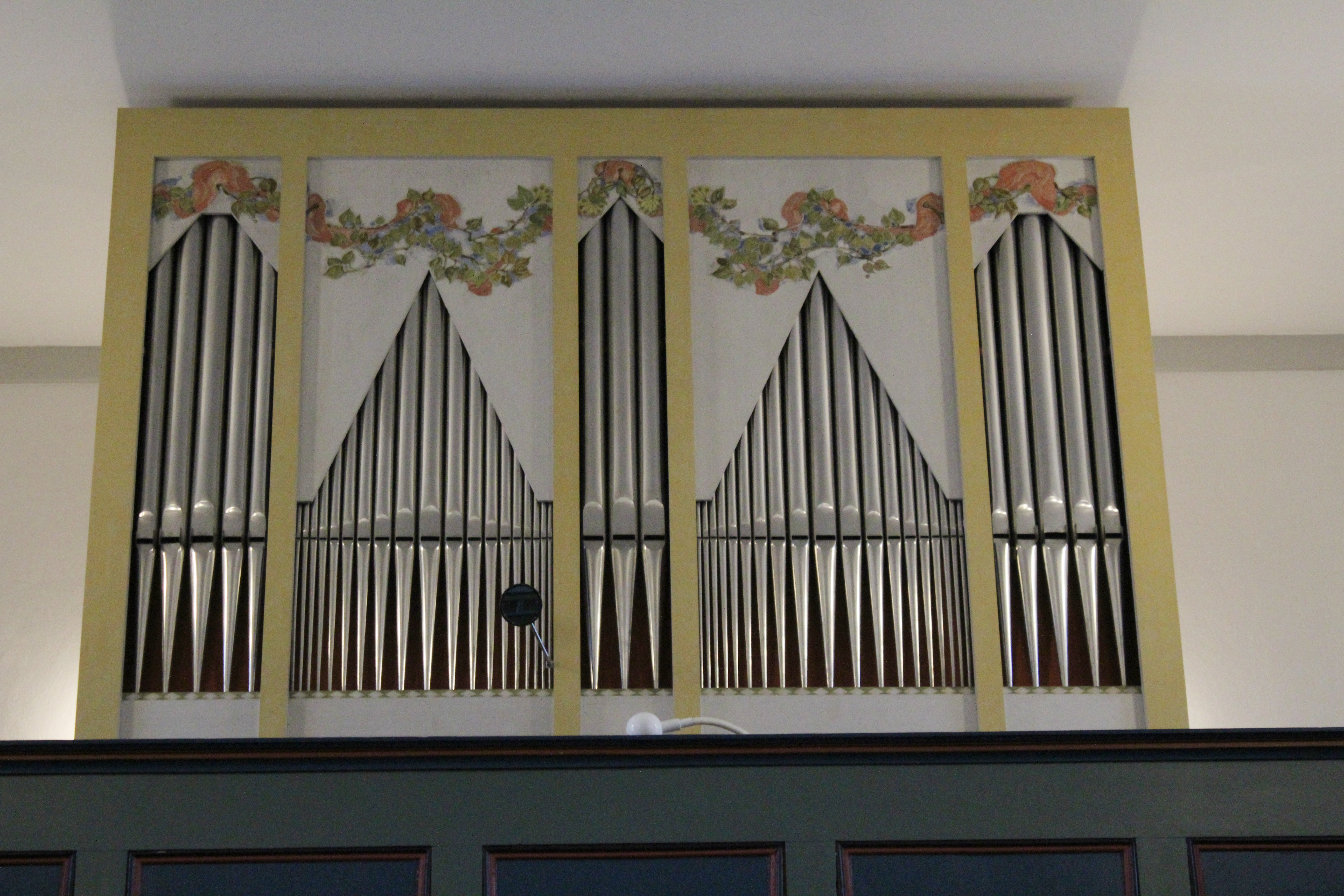 Evangelische Kirche Oberdieten, Breidenbach, Landkreis Marburg-Biedenkopf, Hessen, Deutschland